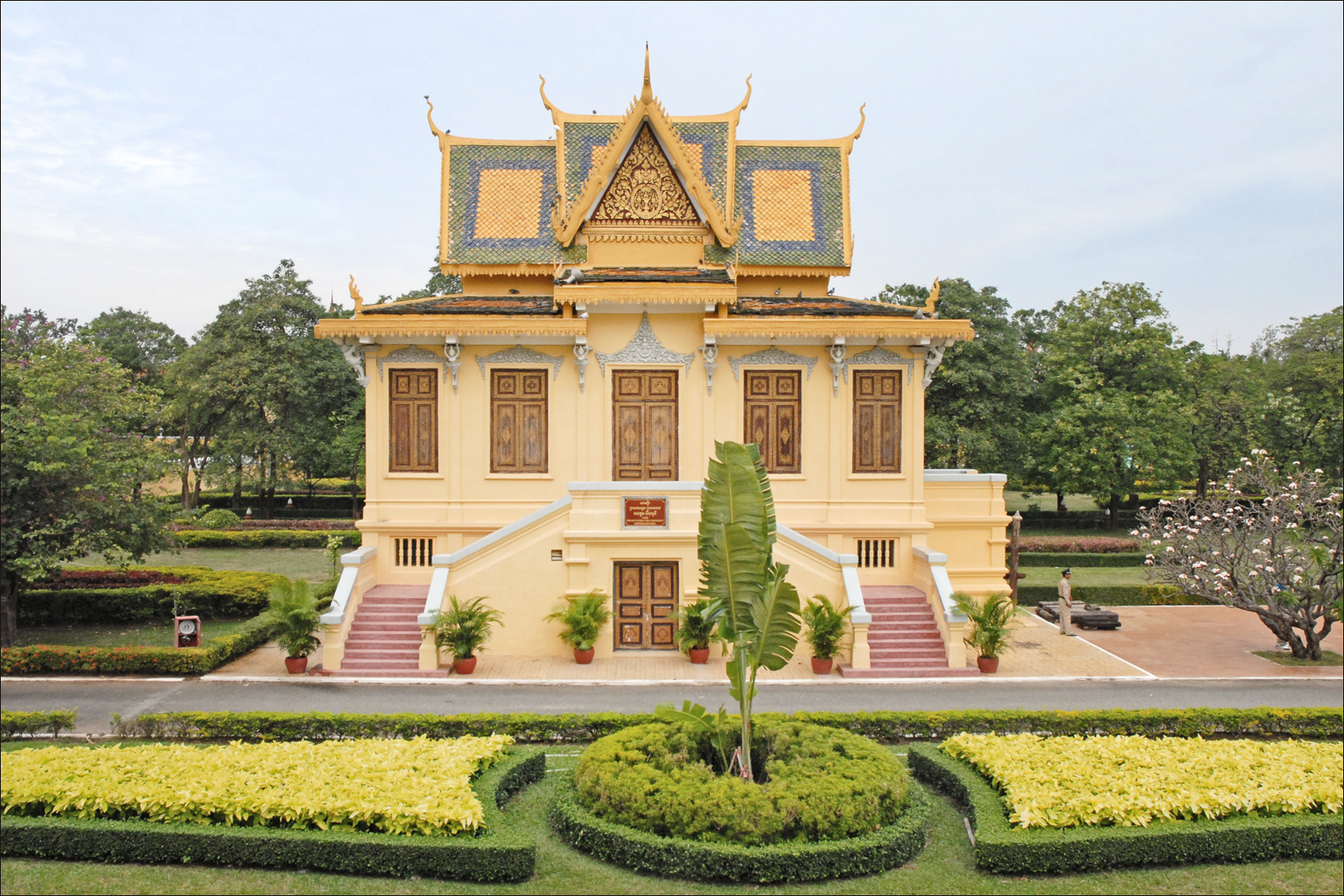 Ce pavillon comprend une plateforme permettant au Roi de monter ou descendre d'éléphant. Autre photographie du pavillon L'album Flickr sur le Palais royal